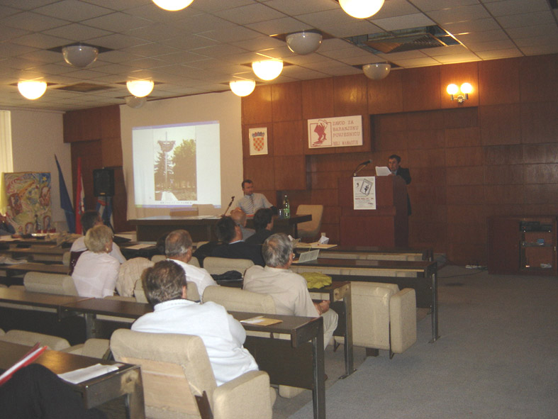 Mohačka pogibelj 1526.-2006., znanstveni kolokvij u Belom Manastiru, 29. VIII. 2006.